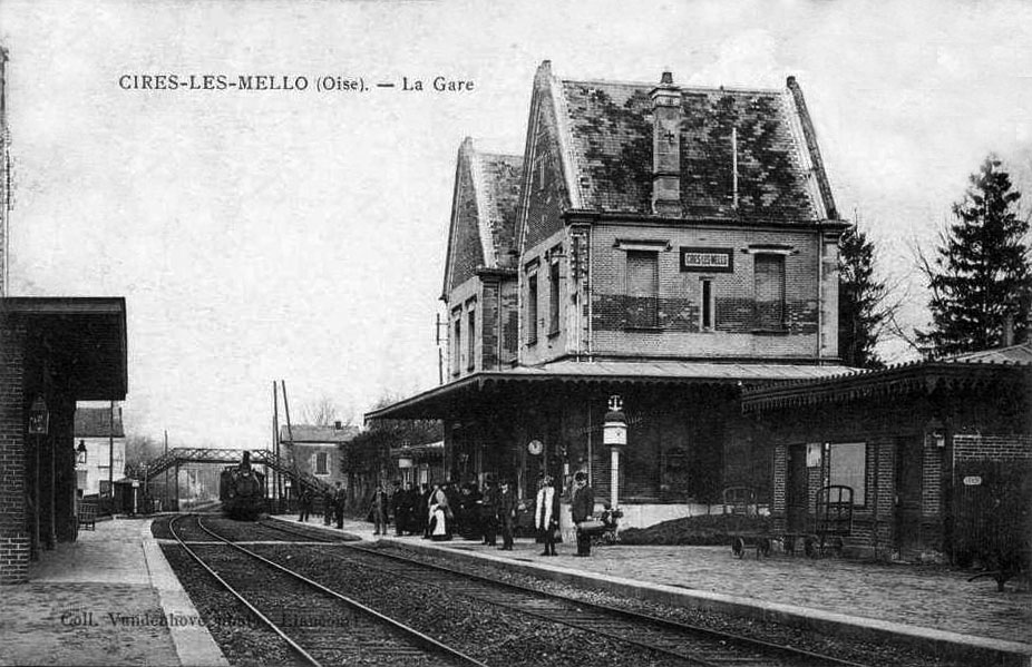 L'intérieur de la gare de Cires-lès-Mello sur la ligne de Creil à Beauvaix vers 1900.